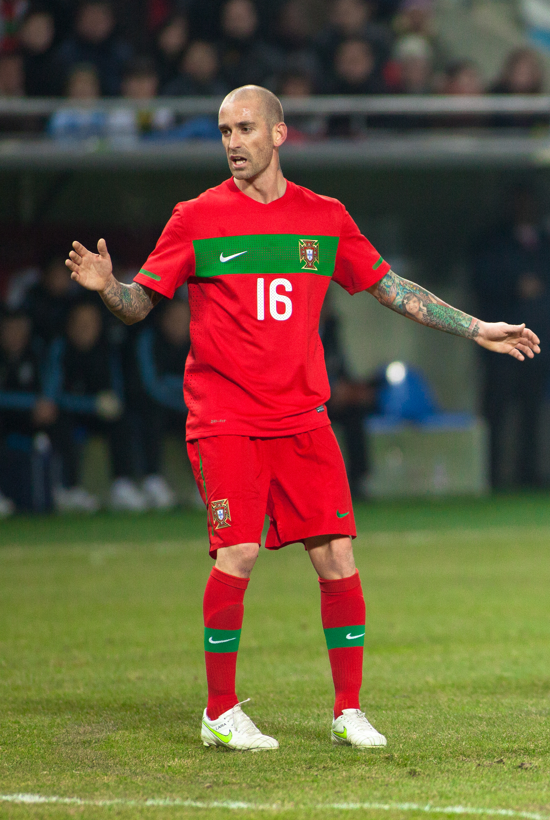 Raul Meireles lors du match amical Argentine-Portugal le 9 février 2011 à Genève (Suisse).